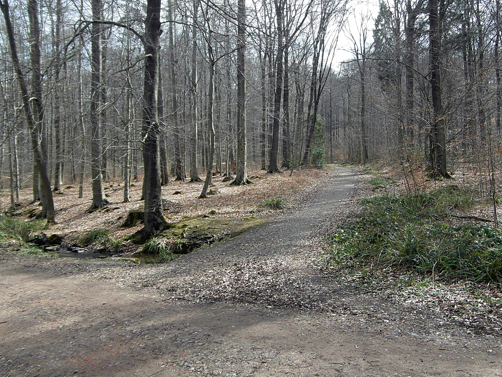 Dieser Weg nutzt die ehemalige Trasse der Kalkbahn im Deister bei Bredenbeck